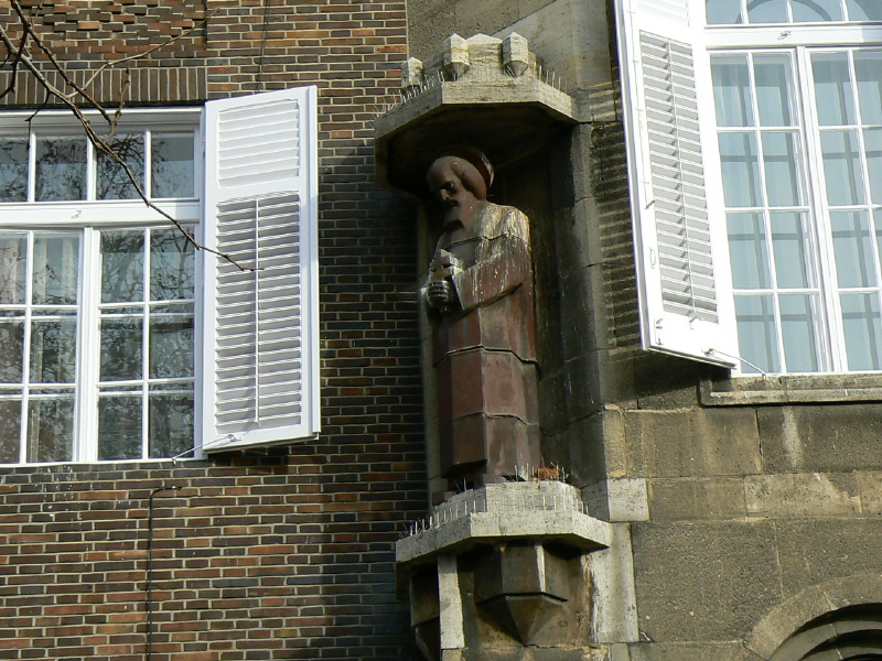 Rerrich Béla Dóm téri épületegyüttesének alighanem legnagyobb érdeme, hogy szakítani tudott a neobarokk áramlattal. Az épületek megformálásában a középkori német és skandináv építészeti stílusok eredetiségéből merített. Ohmann Béla teljes értékű munkatársa tudott lenni, megérezte, hogy az épületek sötét klinker falai, puritán egyszerűségük a megszokottól eltérő megoldást kívánnak a régi stílusok felébresztéséhez. A román stílus archaikus tartózkodását vette alapul.